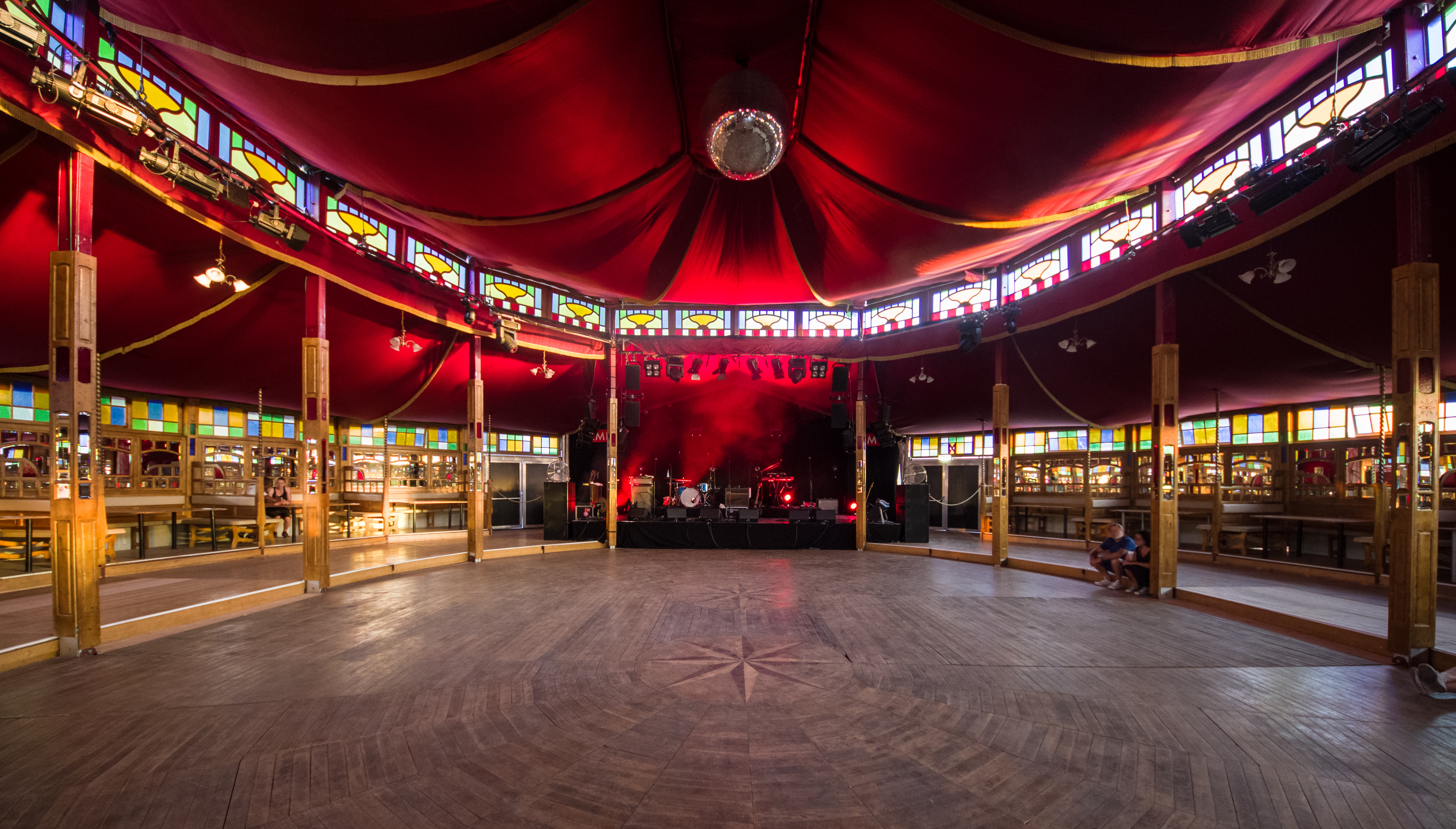 Das Zelt-Musik-Festival 2018 in Freiburg im Breisgau 18.07.2018 Das Spiegelzelt kurz vor der Veranstaltung